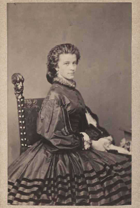 Mathilde, Prinzessin in Bayern-Birkenfeld (1843 - 1925)